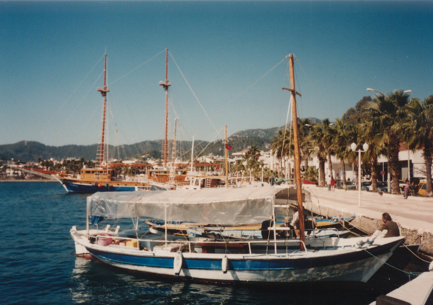 der Hafen von Marmaris, Türkei, 1995